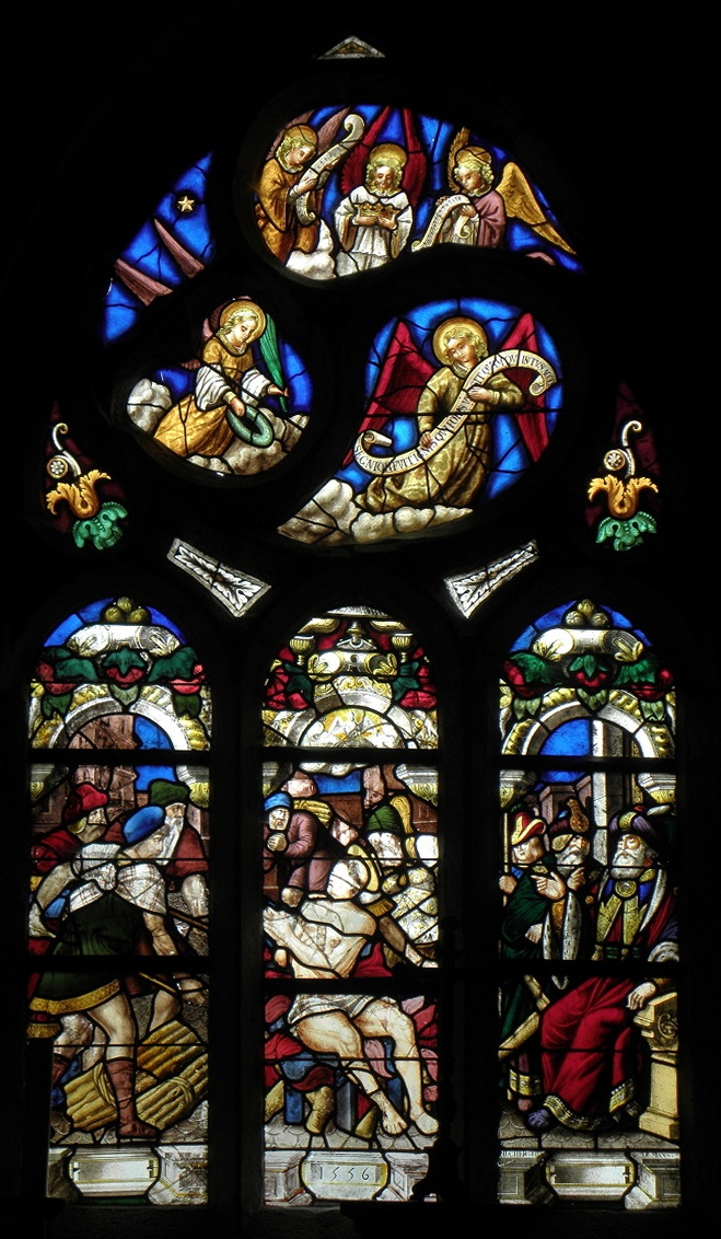 Verrière de Saint-Laurent en la chapelle de Saint-Herbot, commune de Plonévez-du-Faou (29). Datation: 1556 et 1886. Description: martyre de Saint-Laurent.